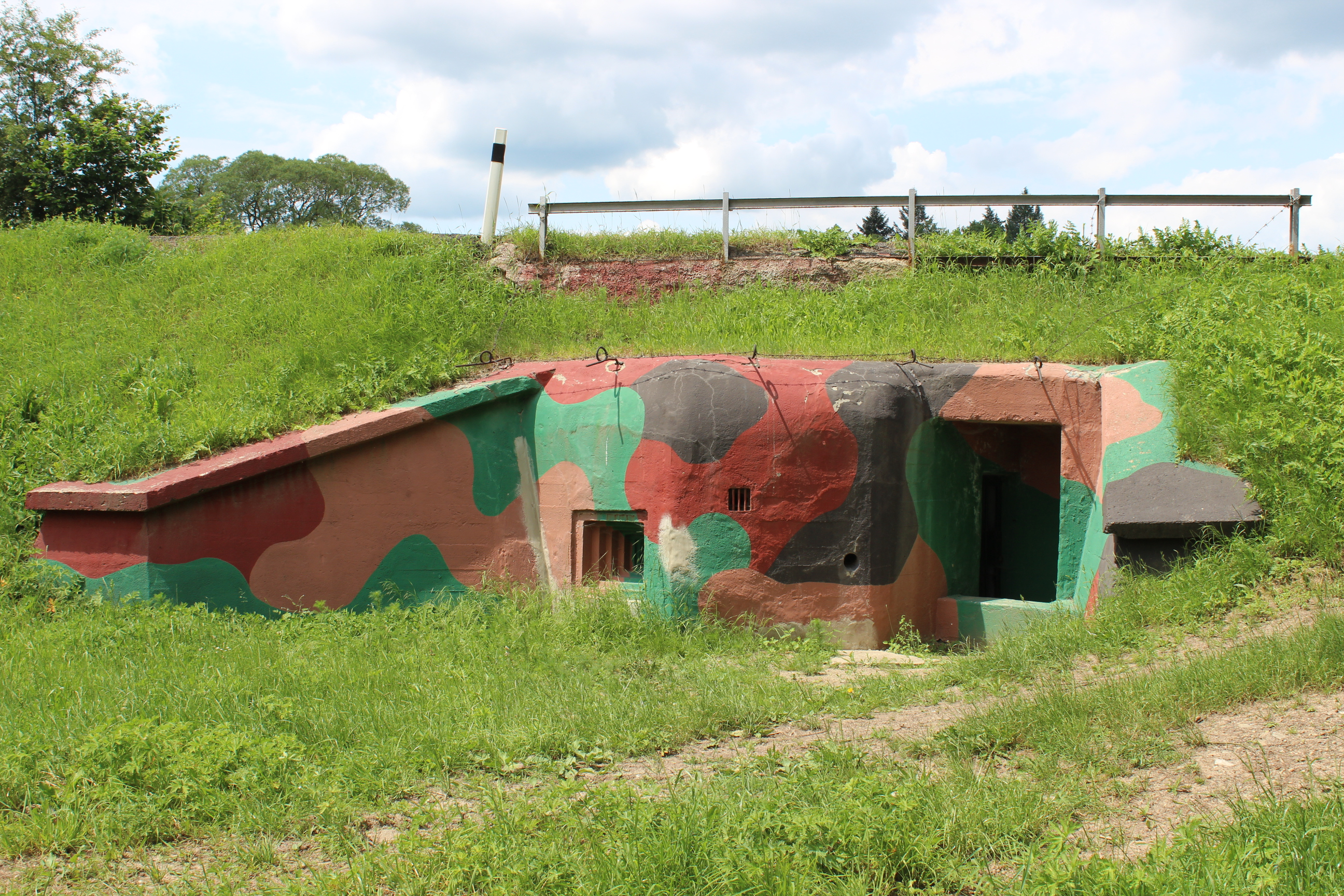 Pohled z východu na památkově chráněný bunkr u Bratronic v kladenském okrese.